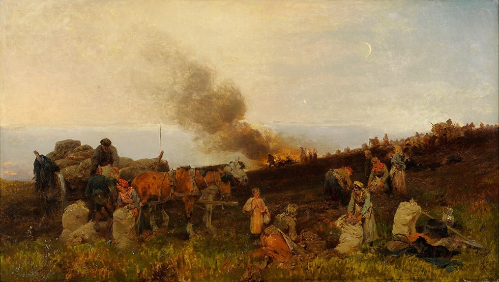 Kartoffelernte. Signiert. Öl/Lwd., 78 x 140 cm